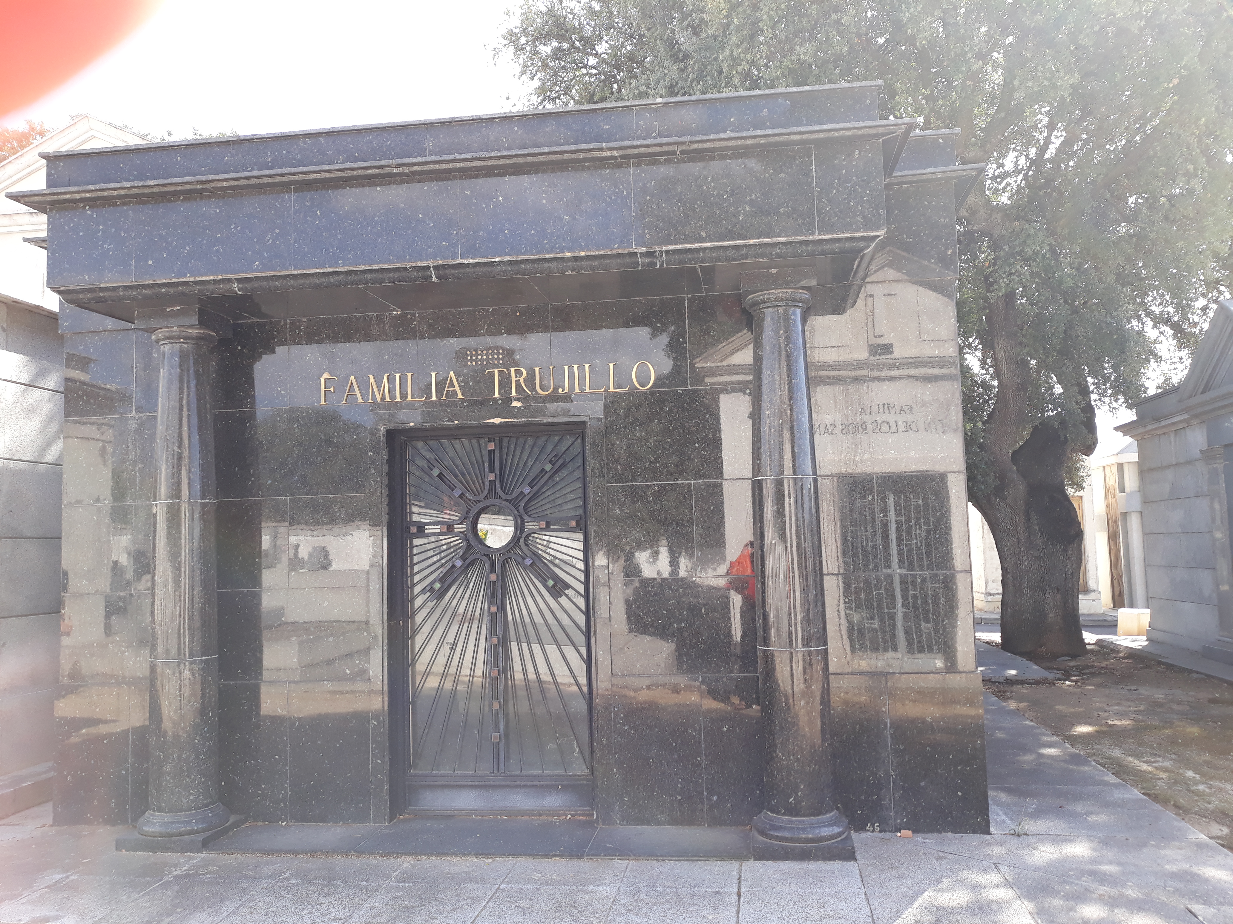 Das Mauoleum des dominikanischen Diktators RafaelTrujillo auf dem Mingorrubio Friedhof in Madrid-El Pardo.